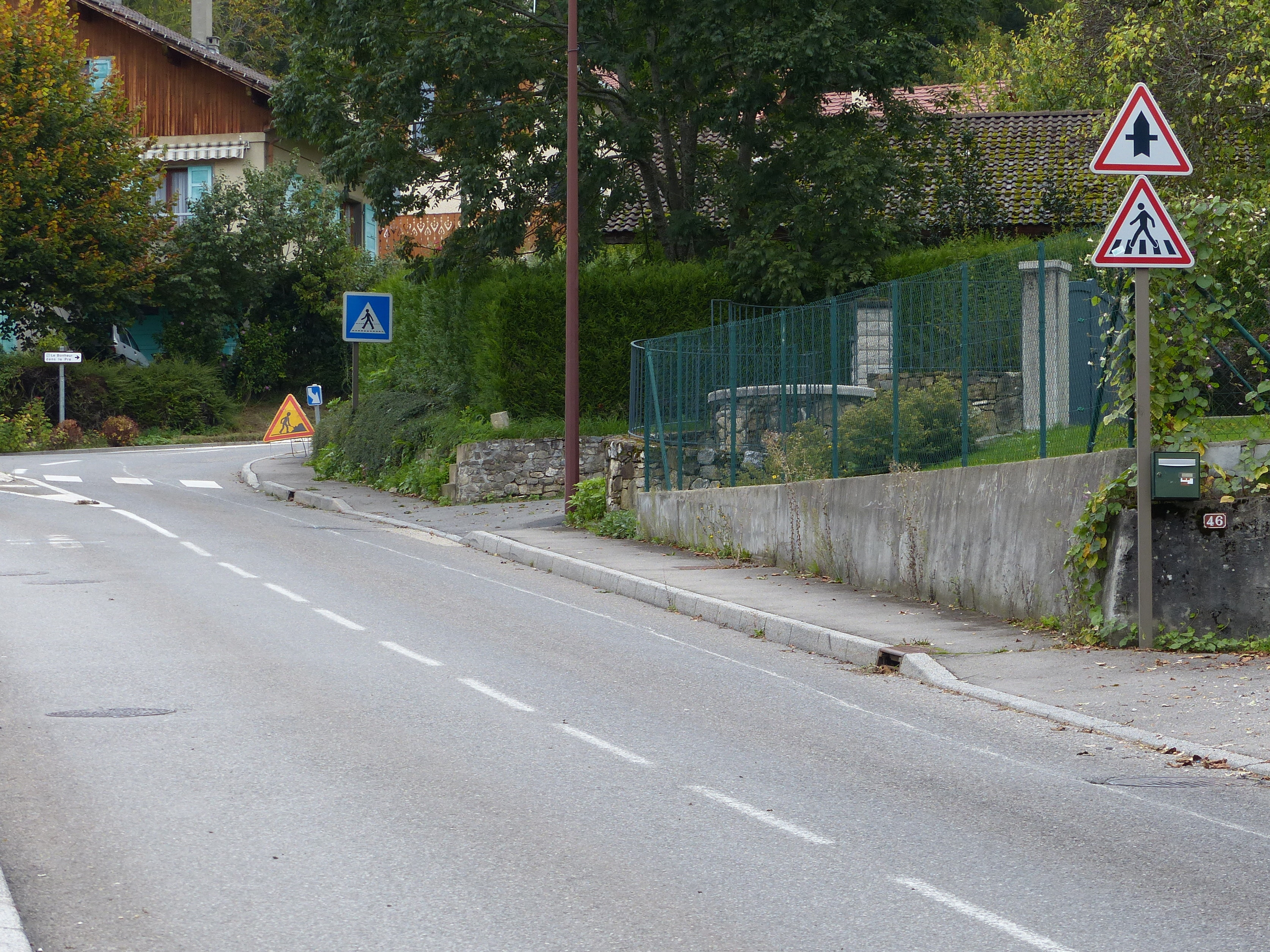 Panneaux routiers français A13b, AB2, C20a et AK5.